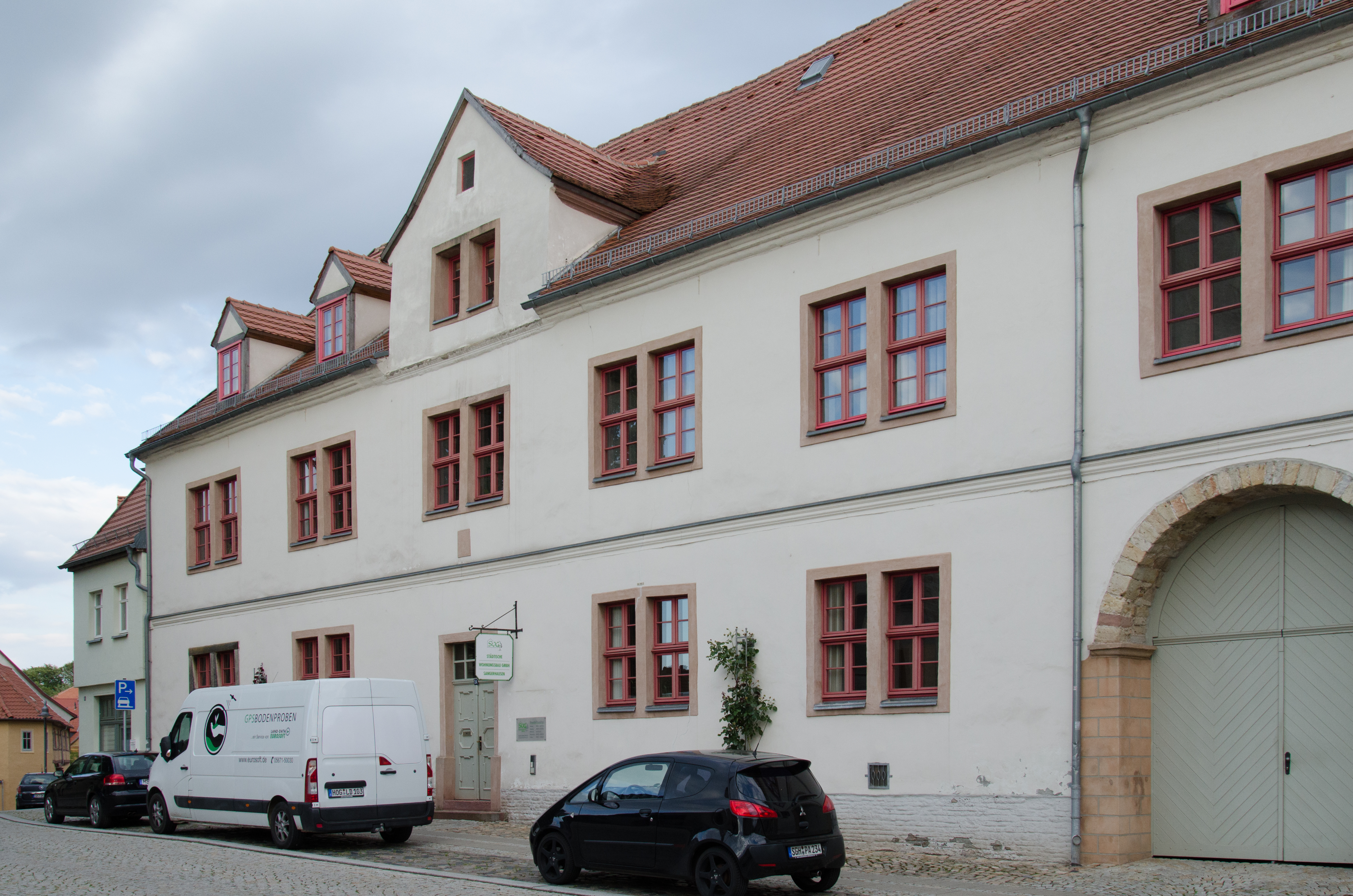 Sangerhausen, Ulrichstraße 24